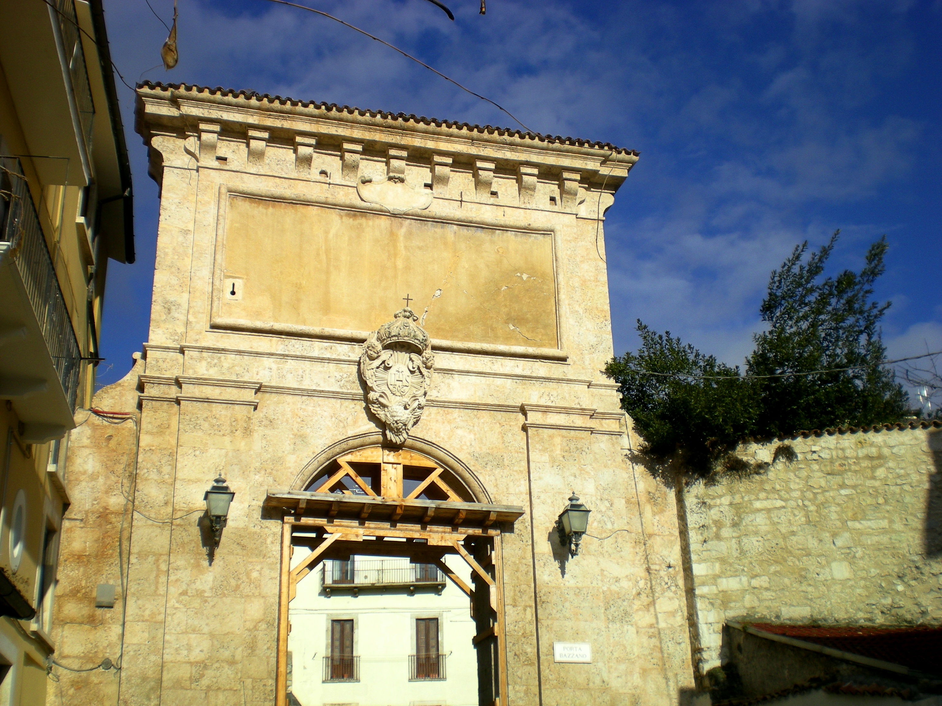 Porta Bazzano (L'Aquila): danneggiamenti in seguito al terremoto del 2009